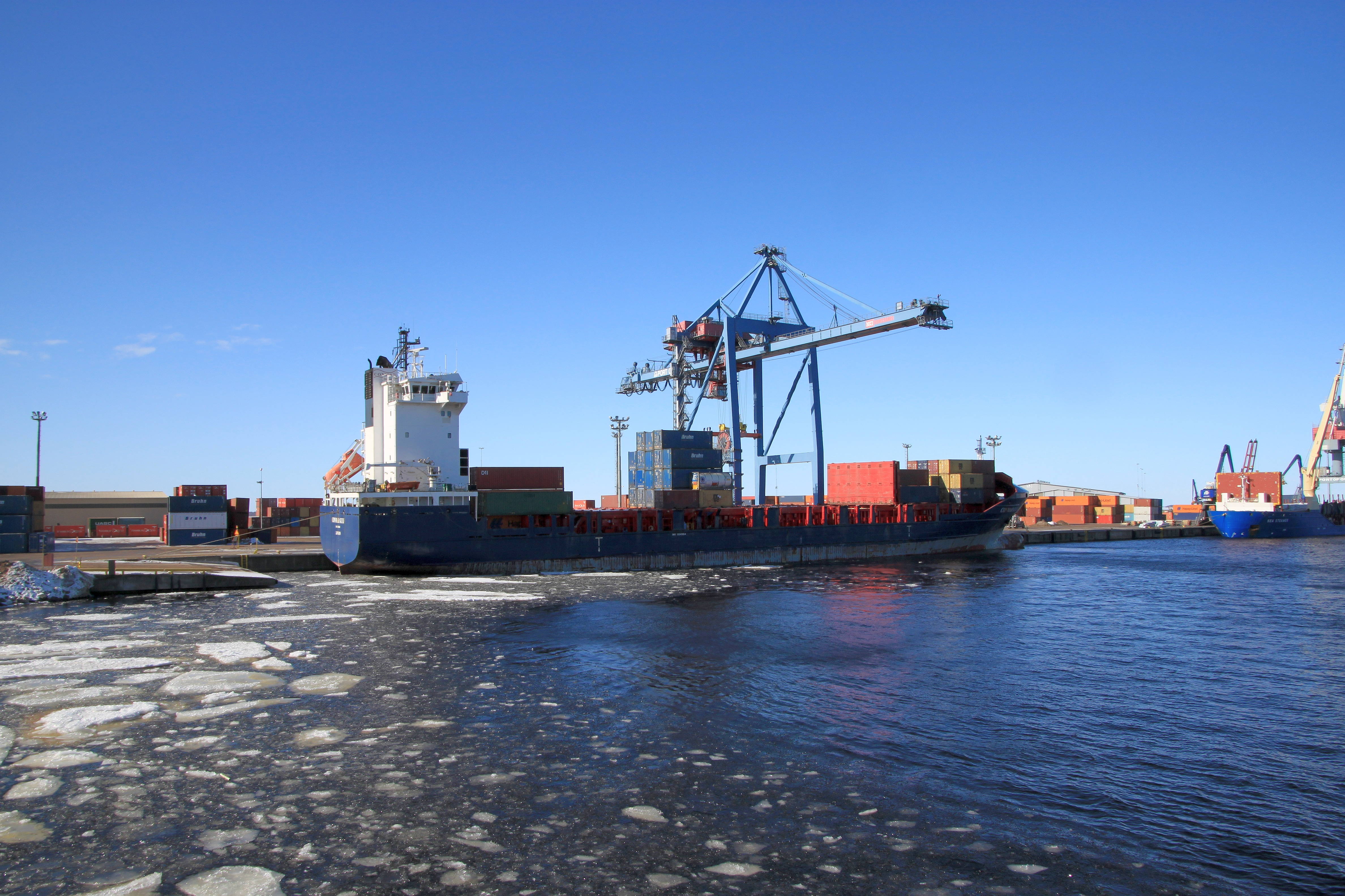 Entladung der CONMAR GULF (IMO 9341964) in Port of Oulu